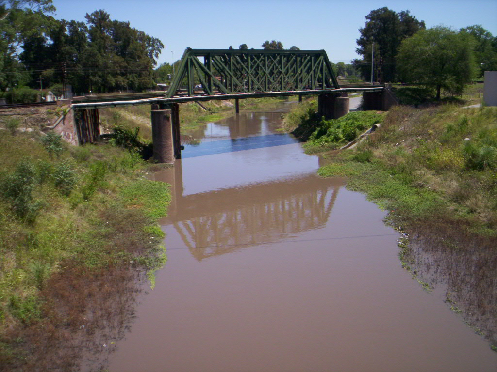 Puente ferroviario que atraviesa el Río Reconquista, entre las ciudades de Merlo y Paso del Rey.